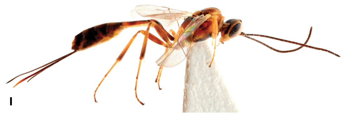 Schlupfwespe, Unterfamilie Cremastinae, Temelucha rea, Habitus von der Seite, aus der Originalbeschreibung, aus Malta